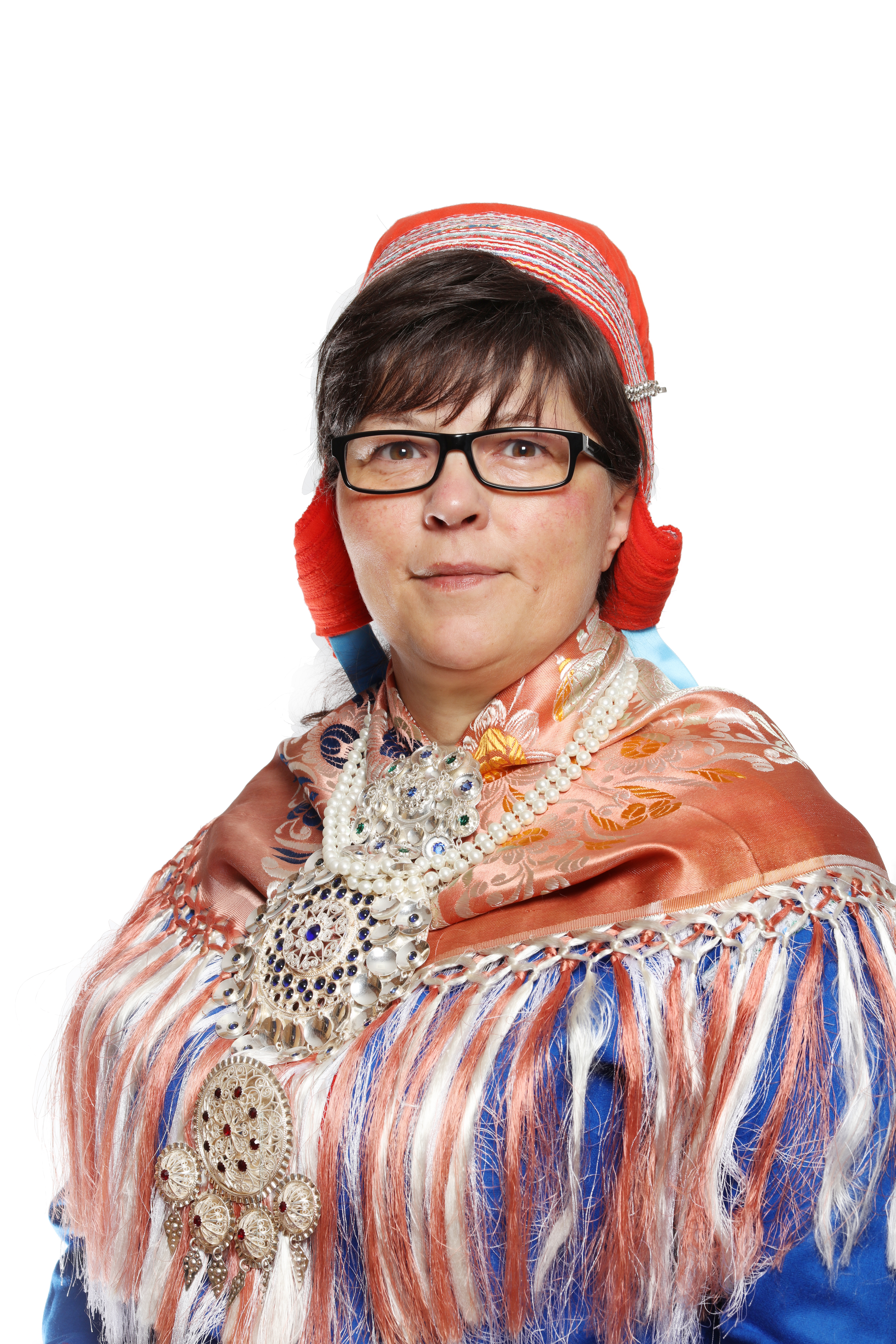 Berit Marie P E Eira samepolitiker 2017